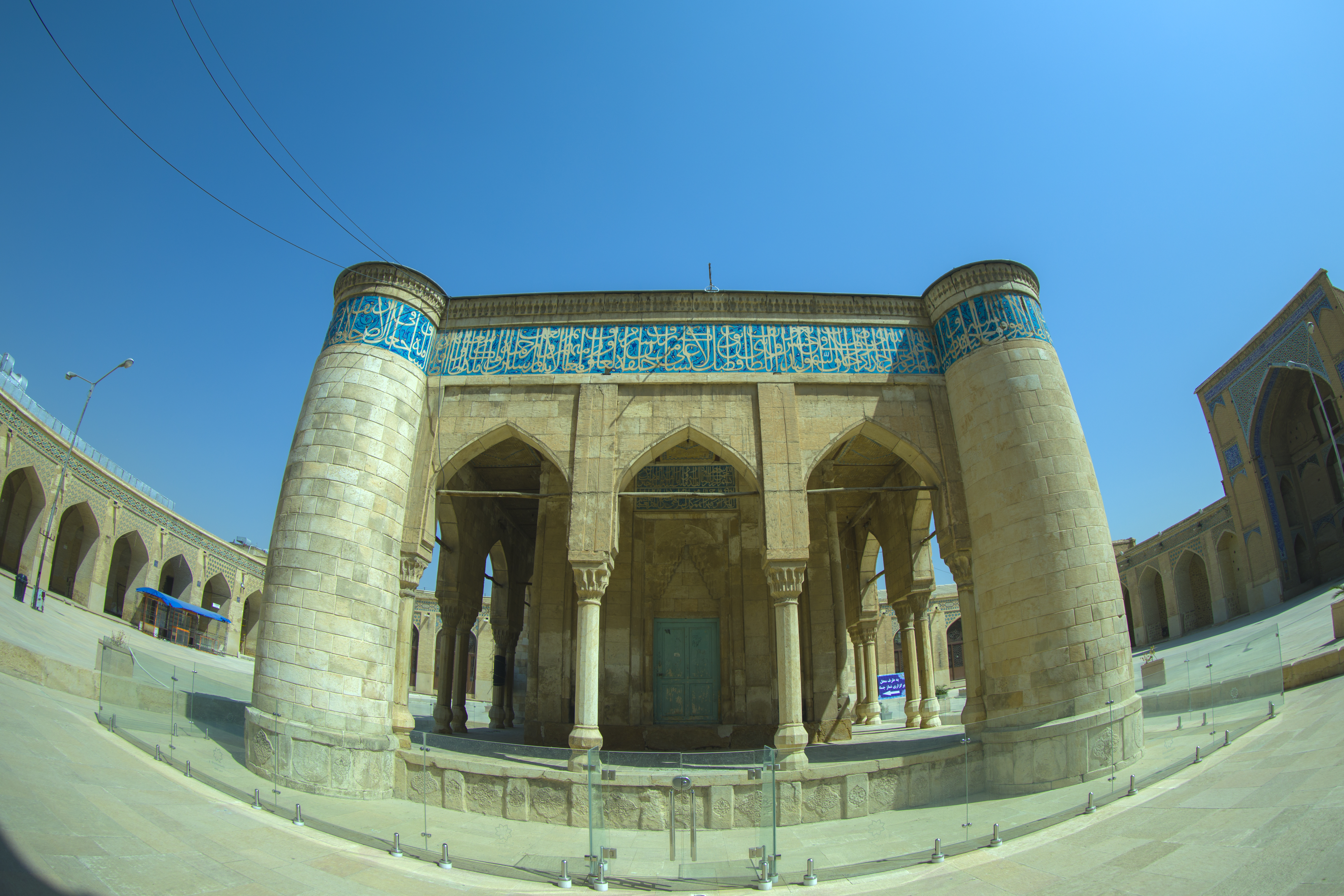 مسجد جامع عتیق کهنترین مسجد شیراز می‌باشد که مسجد جمعه یا آدینه نیز نامیده می‌شود. بنای اولیه این مسجد در سال ۲۸۱ هجری قمری در زمان عمرو لیث صفاری ساخته شده‌است. بعدها شاه اسحق اینجو در سال ۷۵۲ هجری قمری ساختمانی در میان مسجد بنا کرد که آنرا خدایخانه یا دارالمصحف می‌نامند و مکان نگهداری قرآن مجید و مکان تلاوت آن بوده‌است. کتیبه سنگی آن از نمونه‌های ارزنده هنر خطاطی بشمار می‌رود. این کتیبه به خط یحیی الجمالی الصوفی خطاط نامدار زمان شاه اسحق نوشته شده و حاوی جملاتی در شان قرآن مجید است.